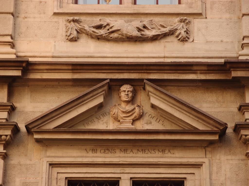 Büste des mystischen Römers Horatius Cocles am Rathaus in Zürich